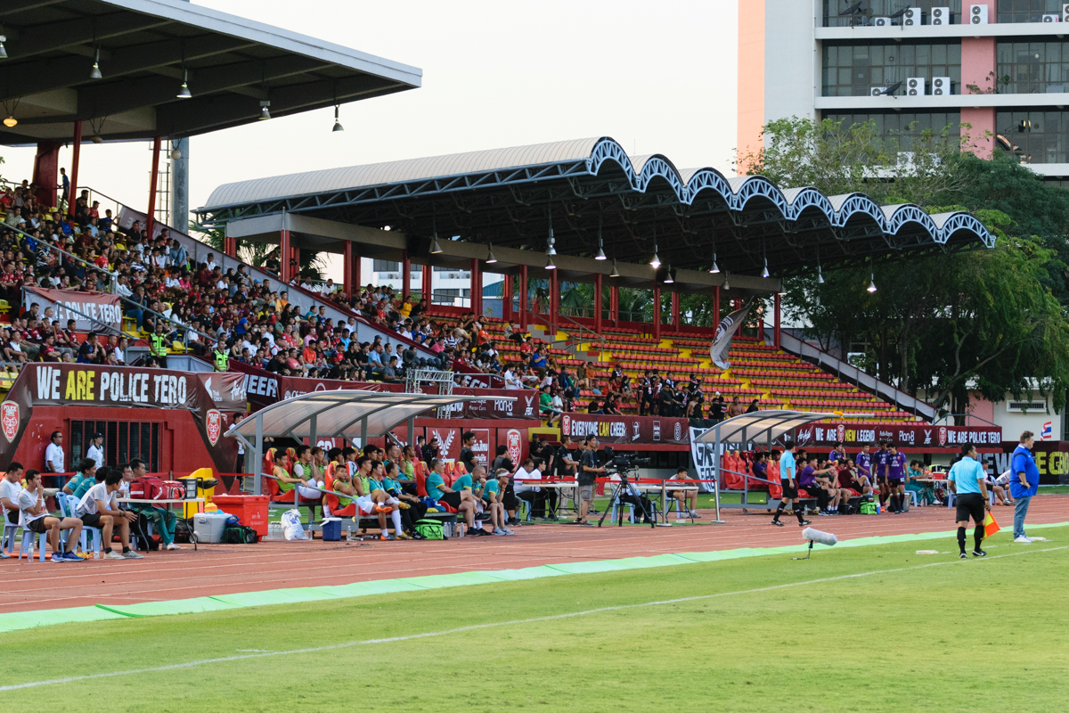 Boonyachinda Stadium